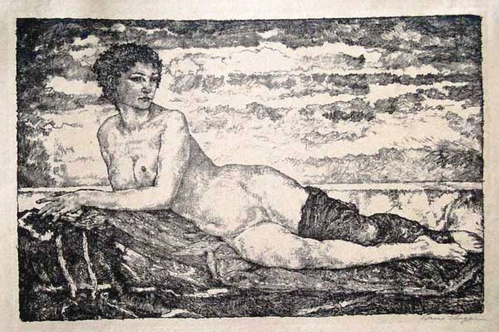 about 1917 (302x463 mm), lithograph